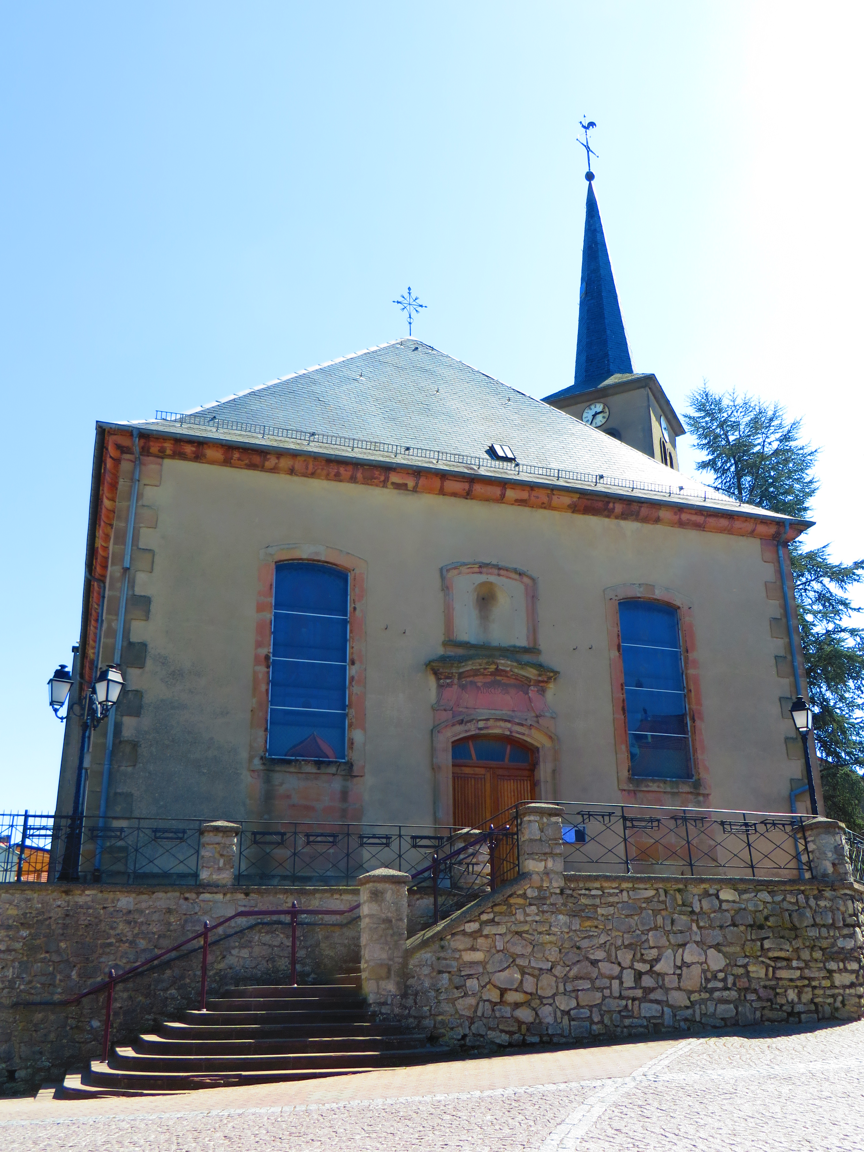 Theding eglise